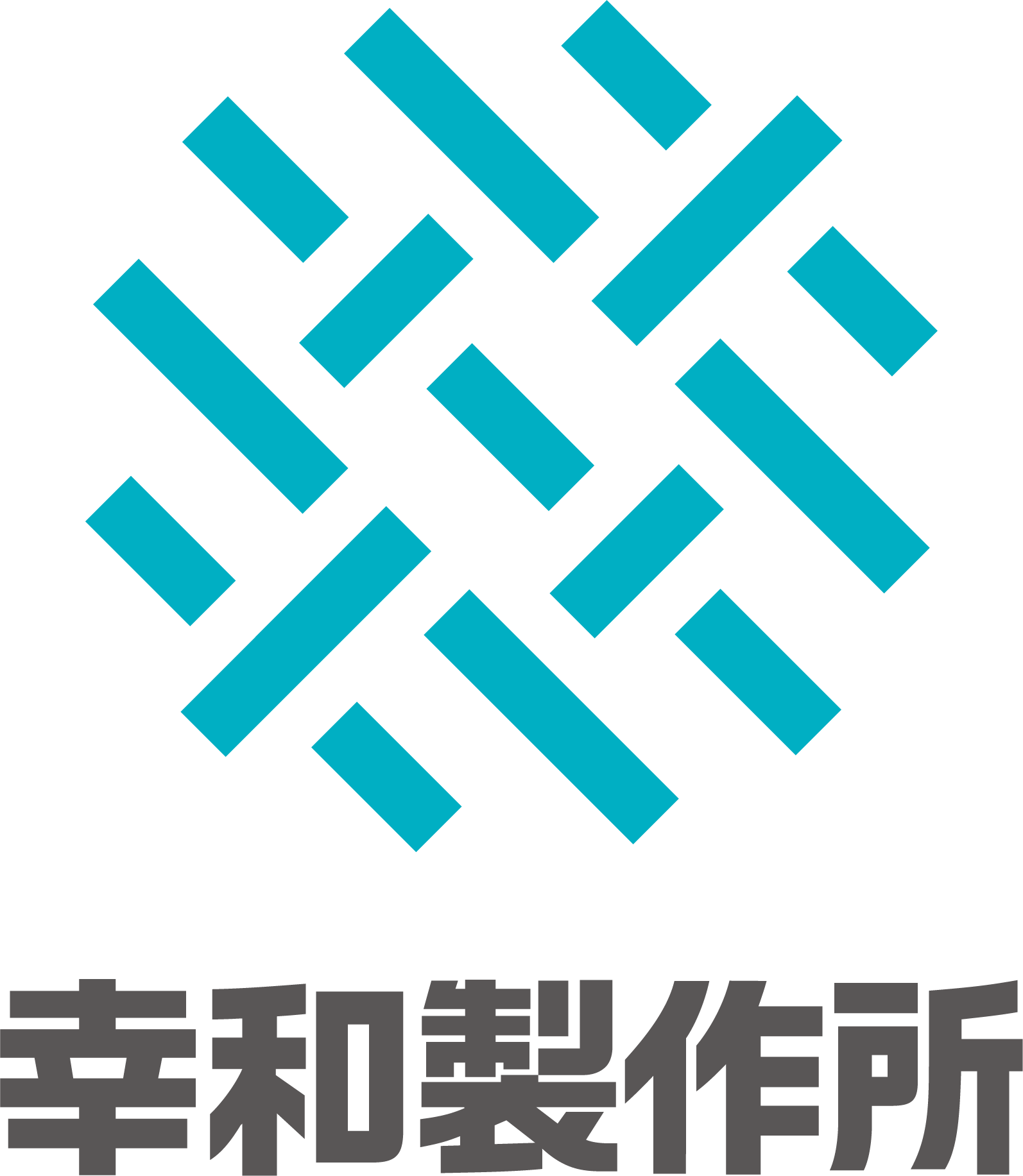 新ロゴ（2019年3月1日～）